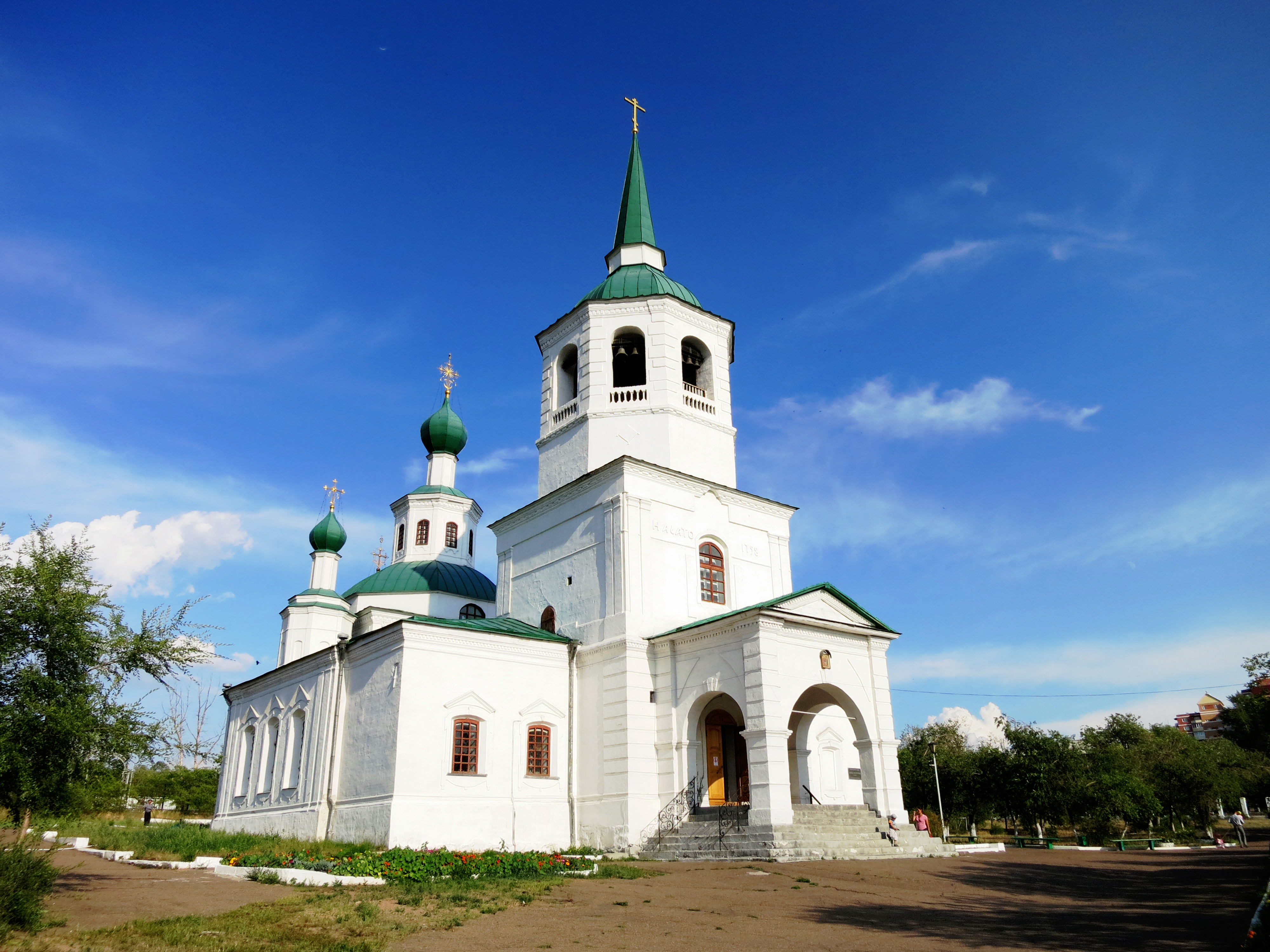 Троицкая церковь (Республика Бурятия, Улан-Удэ, Куйбышева улица, 18 (Гор. ПКО))